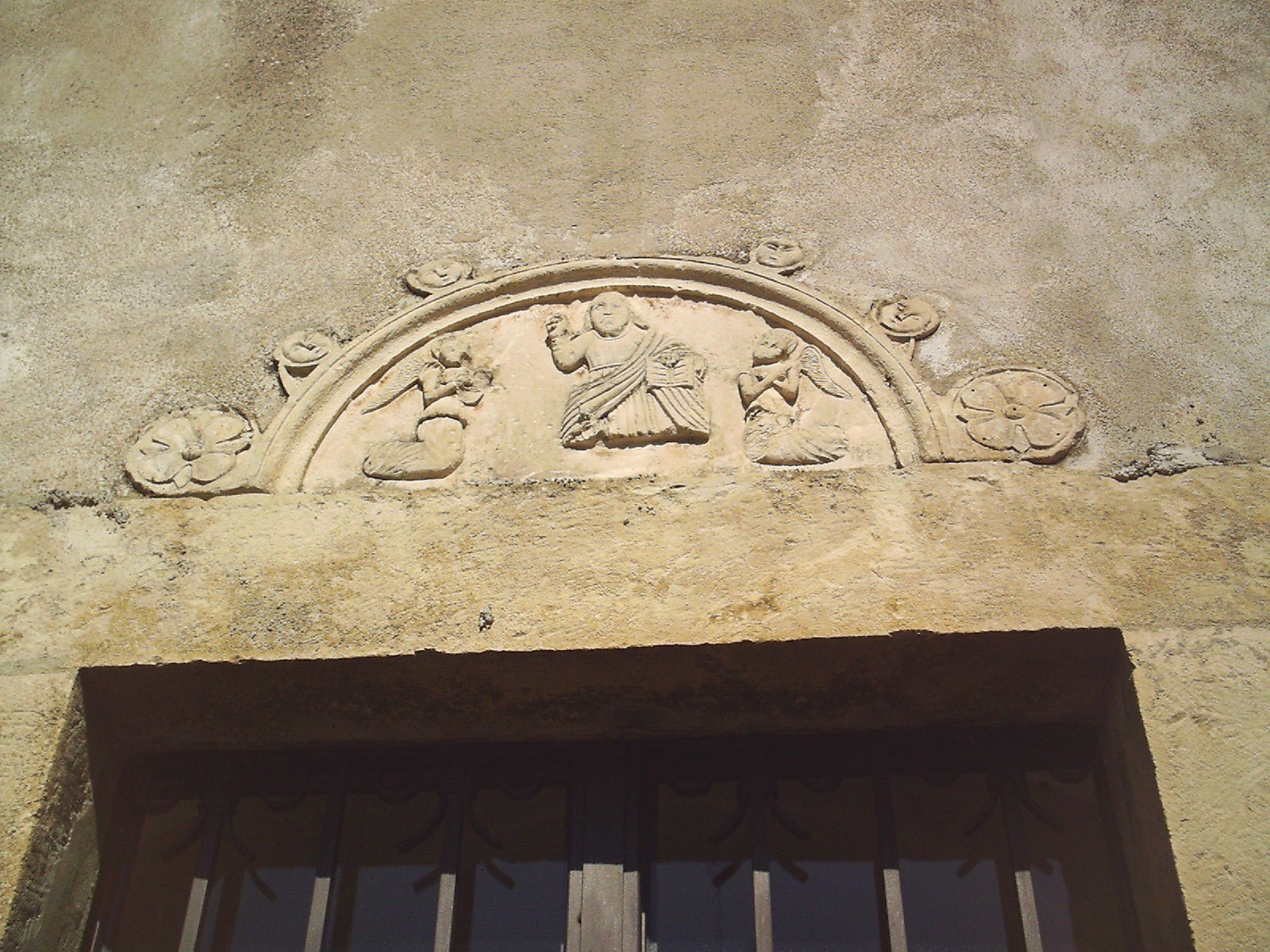 Frontone della chiesa di San Michele Arcangelo a Villalago